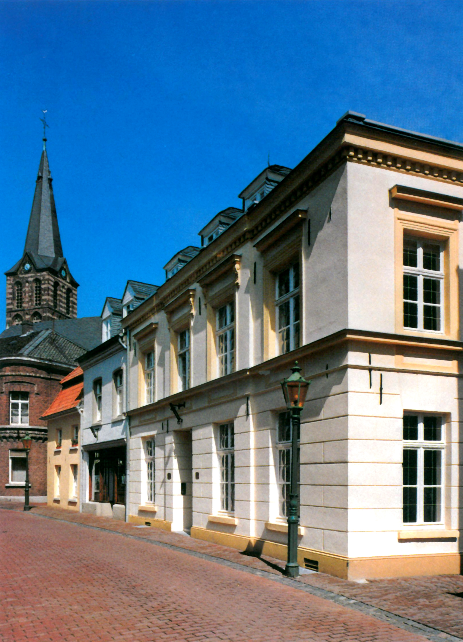 Außenansicht des Europäischen Übersetzer-Kollegiums